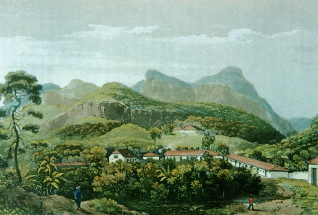 Colonia suíça de Nova Friburgo entre 1818-1830.